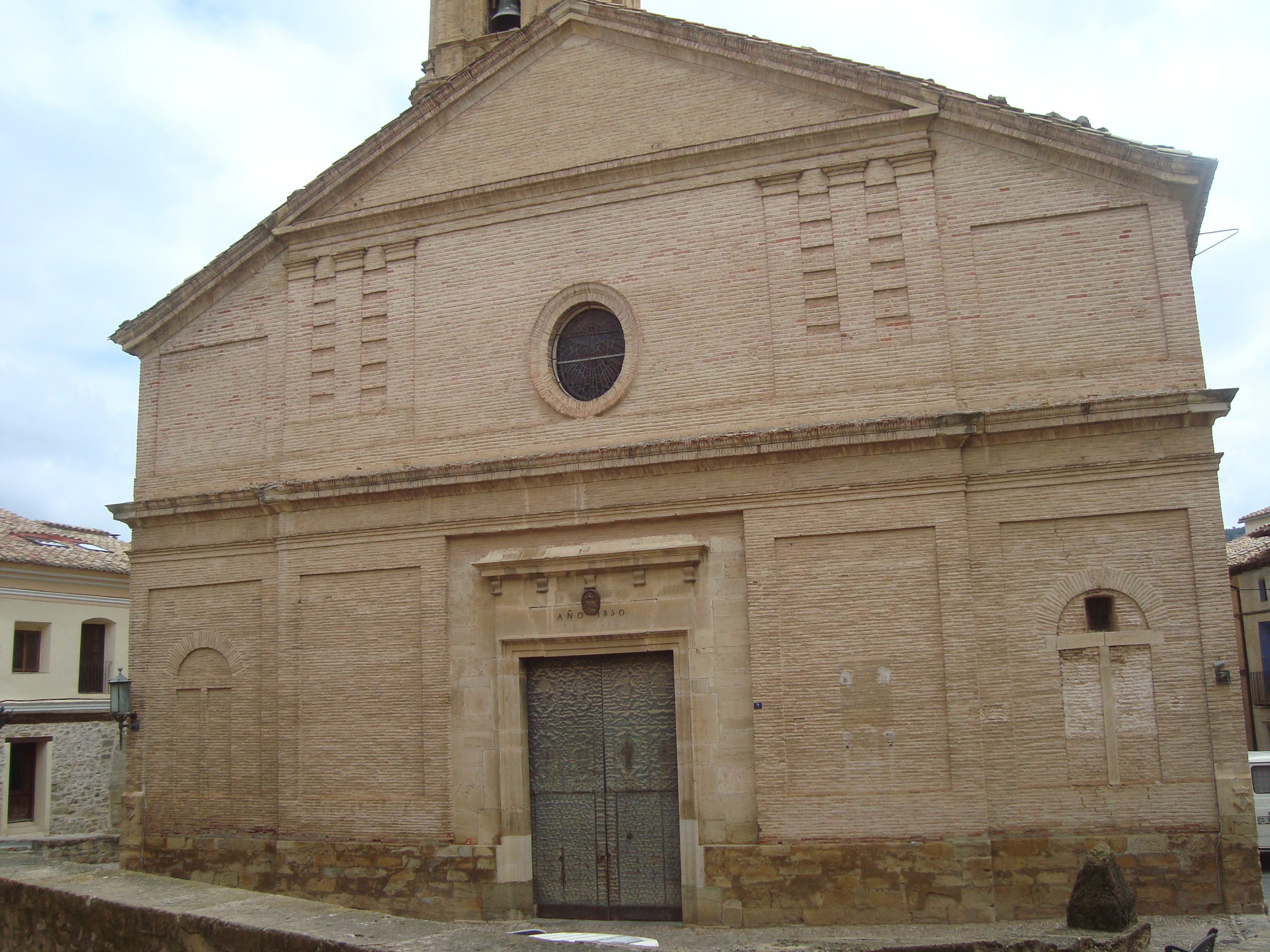 Església parroquial de l'Assumpció (Forcall) 01.061-007.